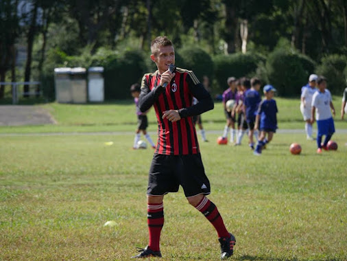 Manuel Belleri Direttore Tecnico AC Milan Tokyo